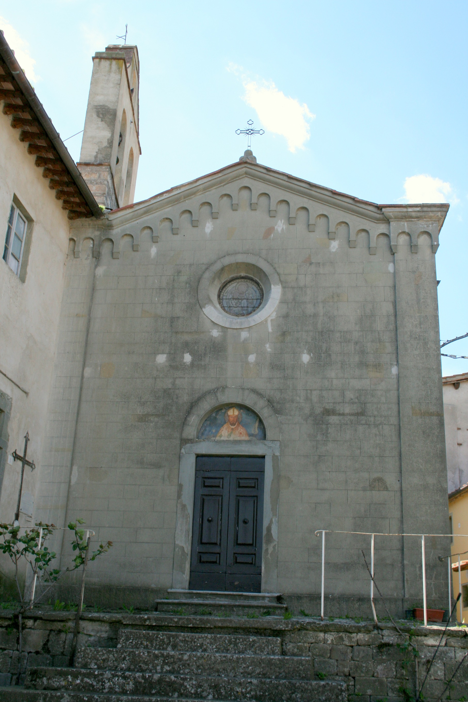 Chiesa di San Donato (Montevardi)